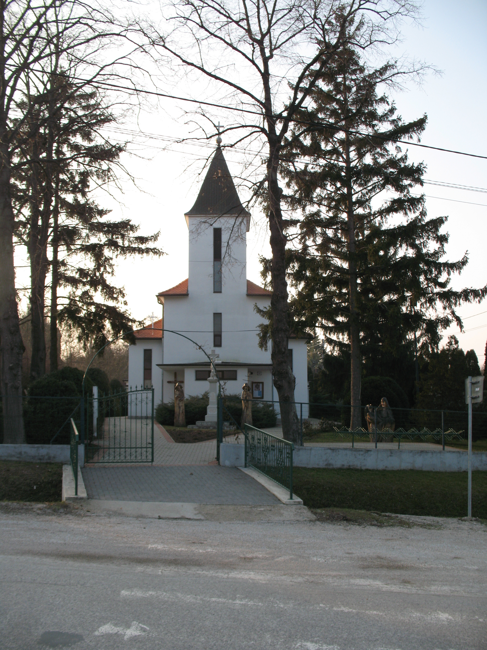 Lapásgyarmat